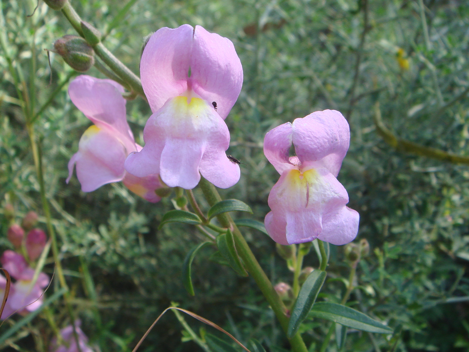 Conejitos (Antirrhinum.... ?) en Ceuta, España.